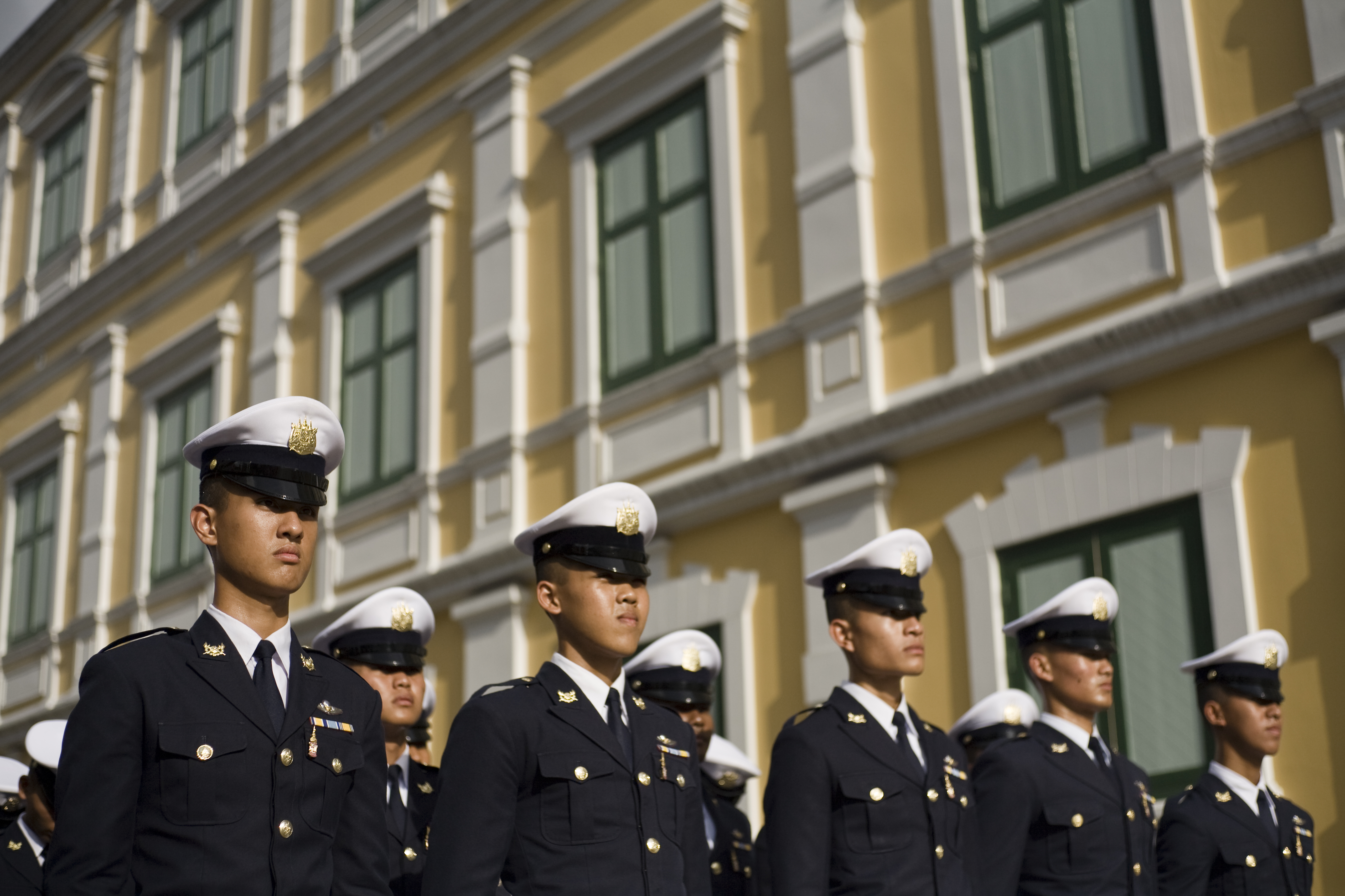 บรรยากาศ ณ มณฑลพิธีท้องสนามหลวง ถนนราชดำเนิน 12สิงหาคม2552 (The Official Site of The Prime Minister of Thailand Photo by พีรพัฒน์ วิมลรังครัตน์)